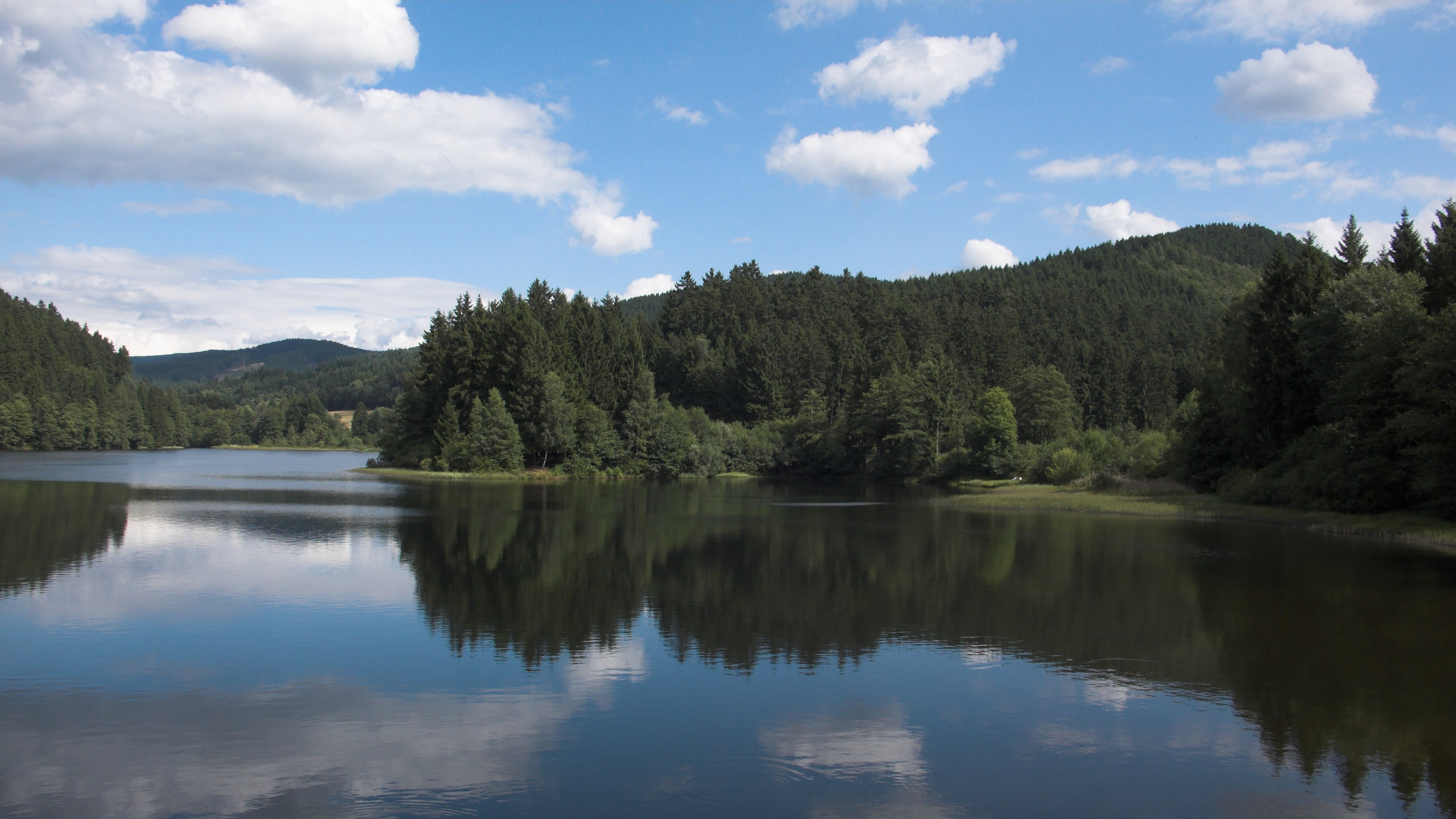 Vorsperre der Sösetalsperre, aufgenommen von Staumauer der Vorsperre